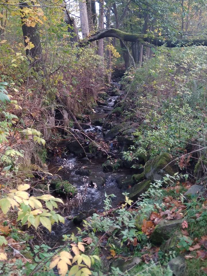 Mikulášovický potok na hranici katastrálních území Mikulášovice a Vilémov